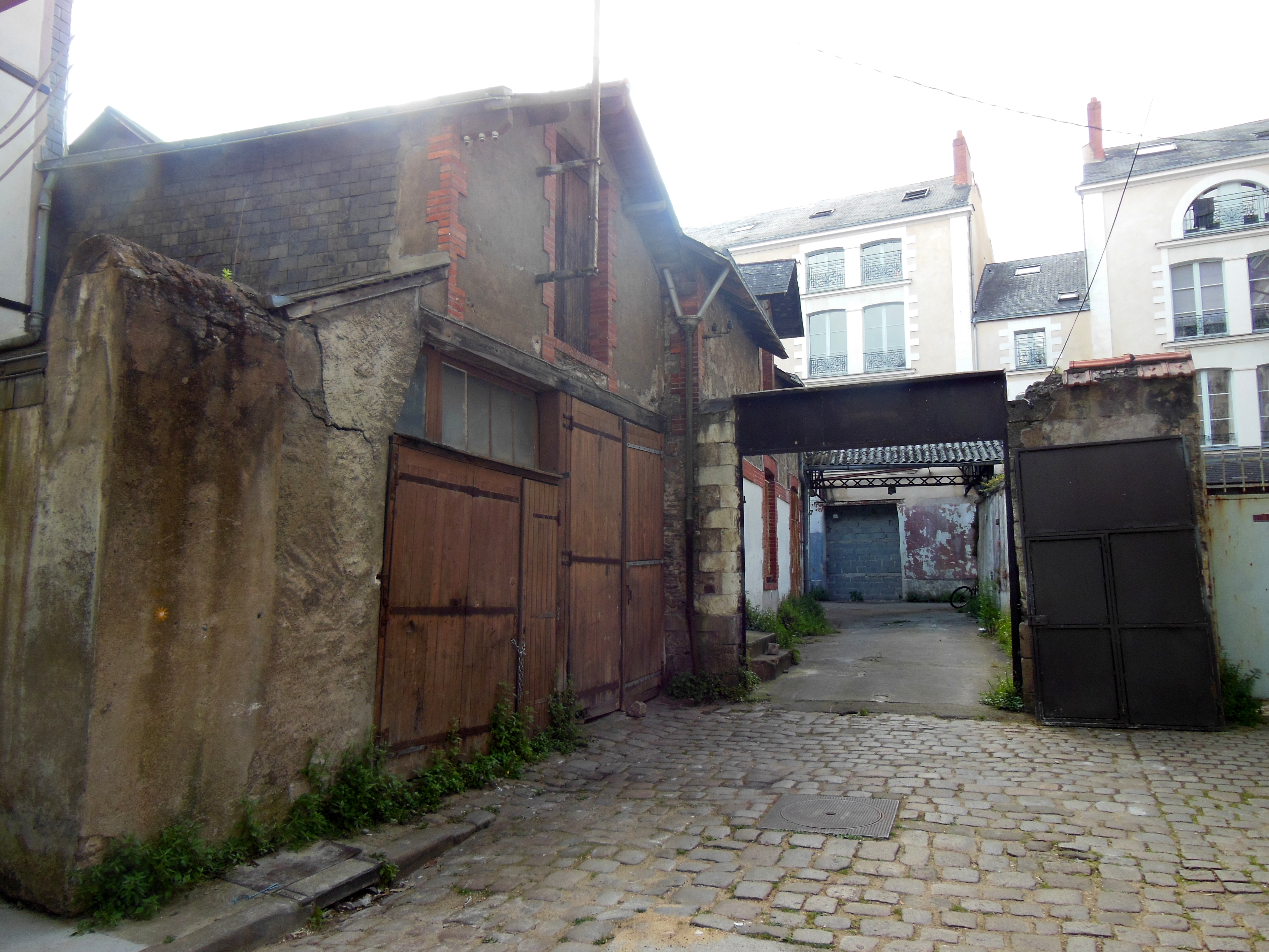 Vue de la cour du 9, allées des Tanneurs, à Nantes (France). En ce lieu se trouvait le "garage de l'Hôtel de Ville" qui était tenu par Raymond Demy, le père du cinéaste français Jacques Demy. La famille y était également domiciliée